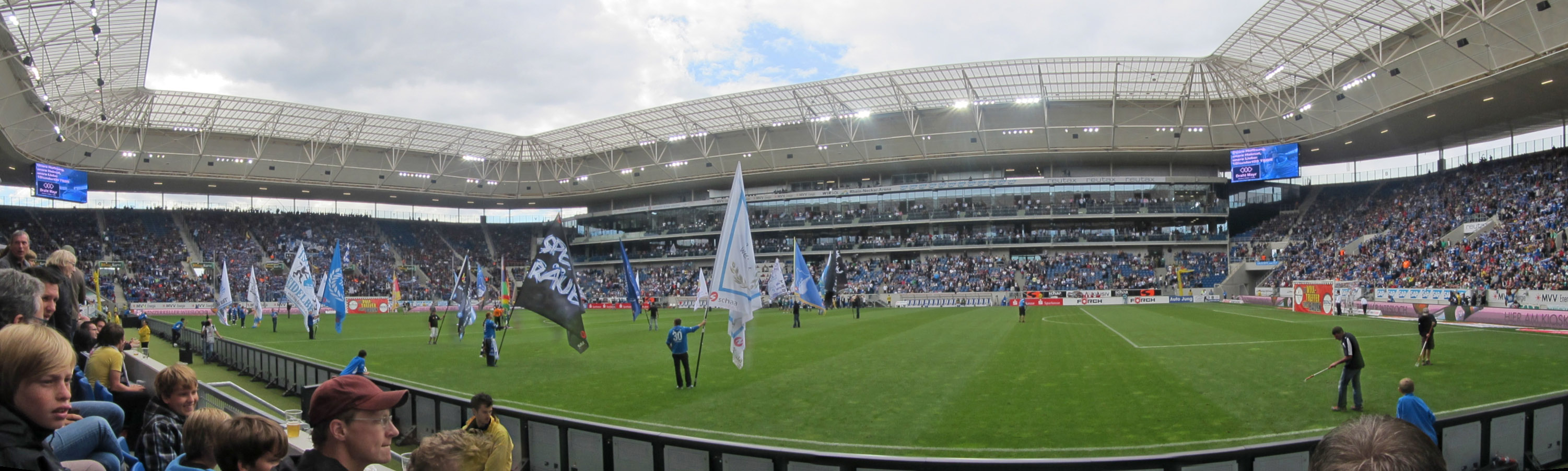 27-Aug-2011, 1899 Hoffenheim - Werder Bremen: Panorama vor dem Anpfiff